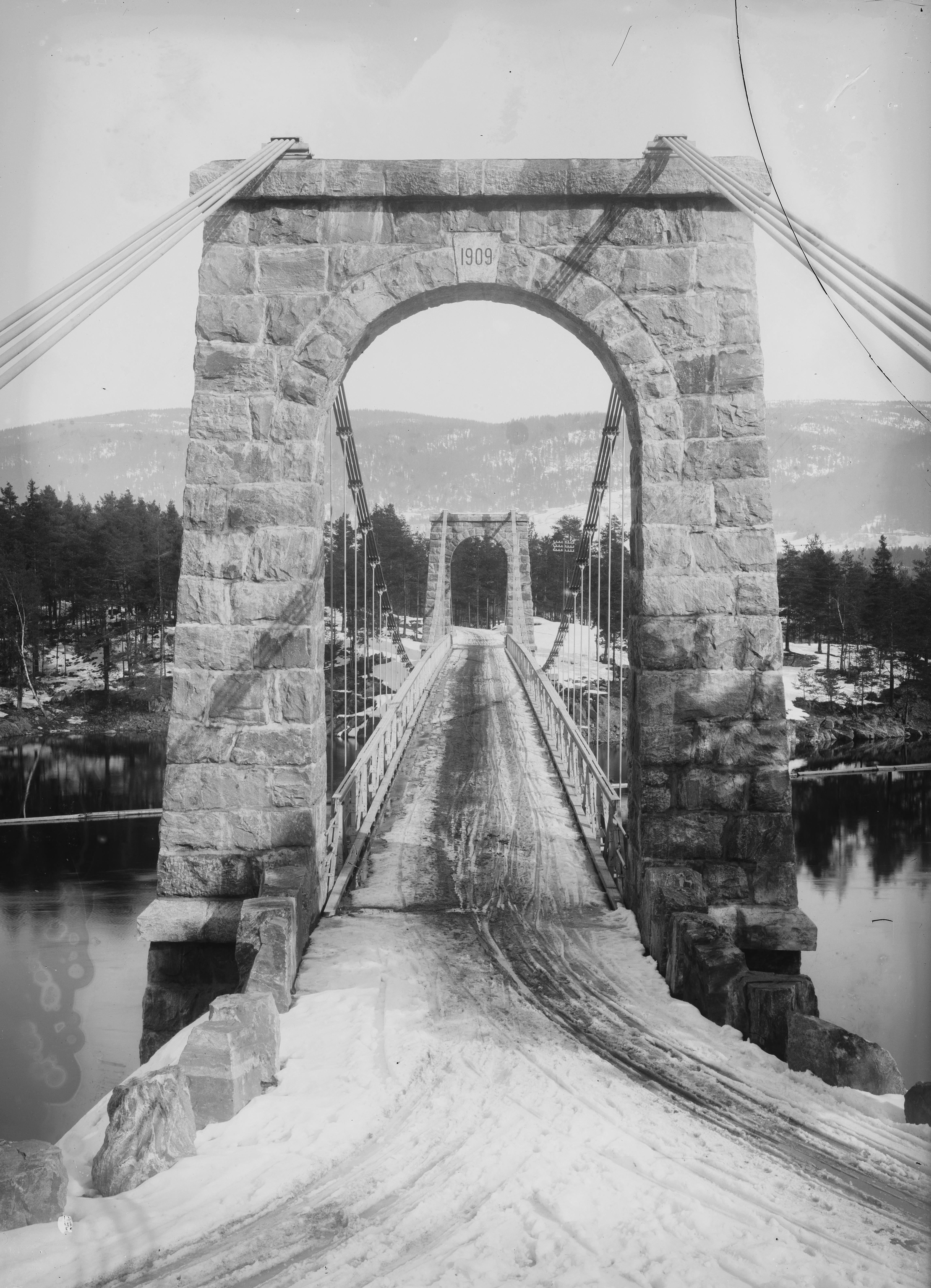 Bildet er hentet fra Nasjonalbibliotekets bildesamling. Anmerkninger til bildet var: Påskrift eske: Modum Påskrift negativ: Gjeitus bro [usikker tyding av skrift] Geithus, Modum, Buskerud